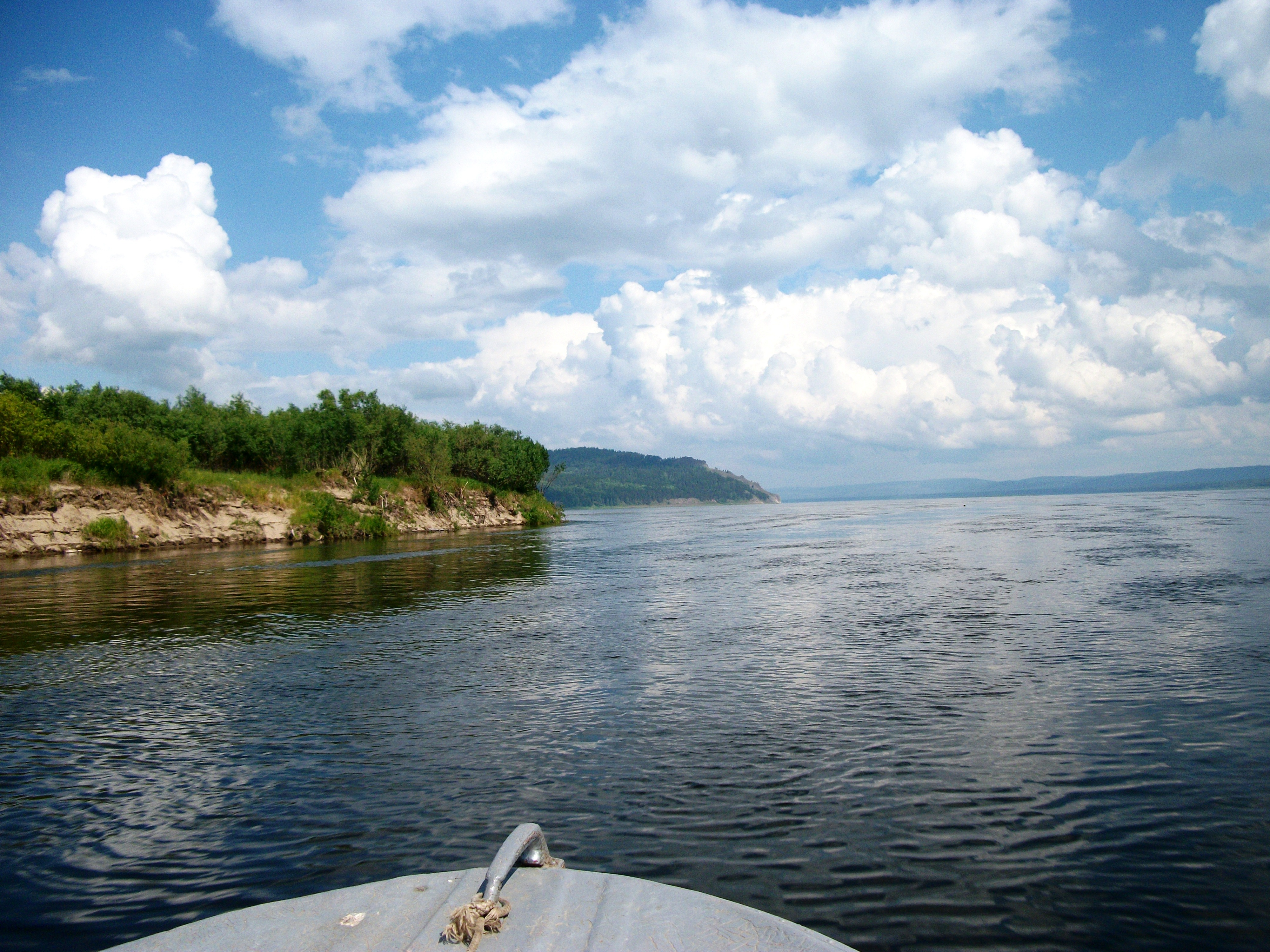 Мотыгинское многоостровье, Мотыгинский район This image is related to the protected area of Russia number 2410145